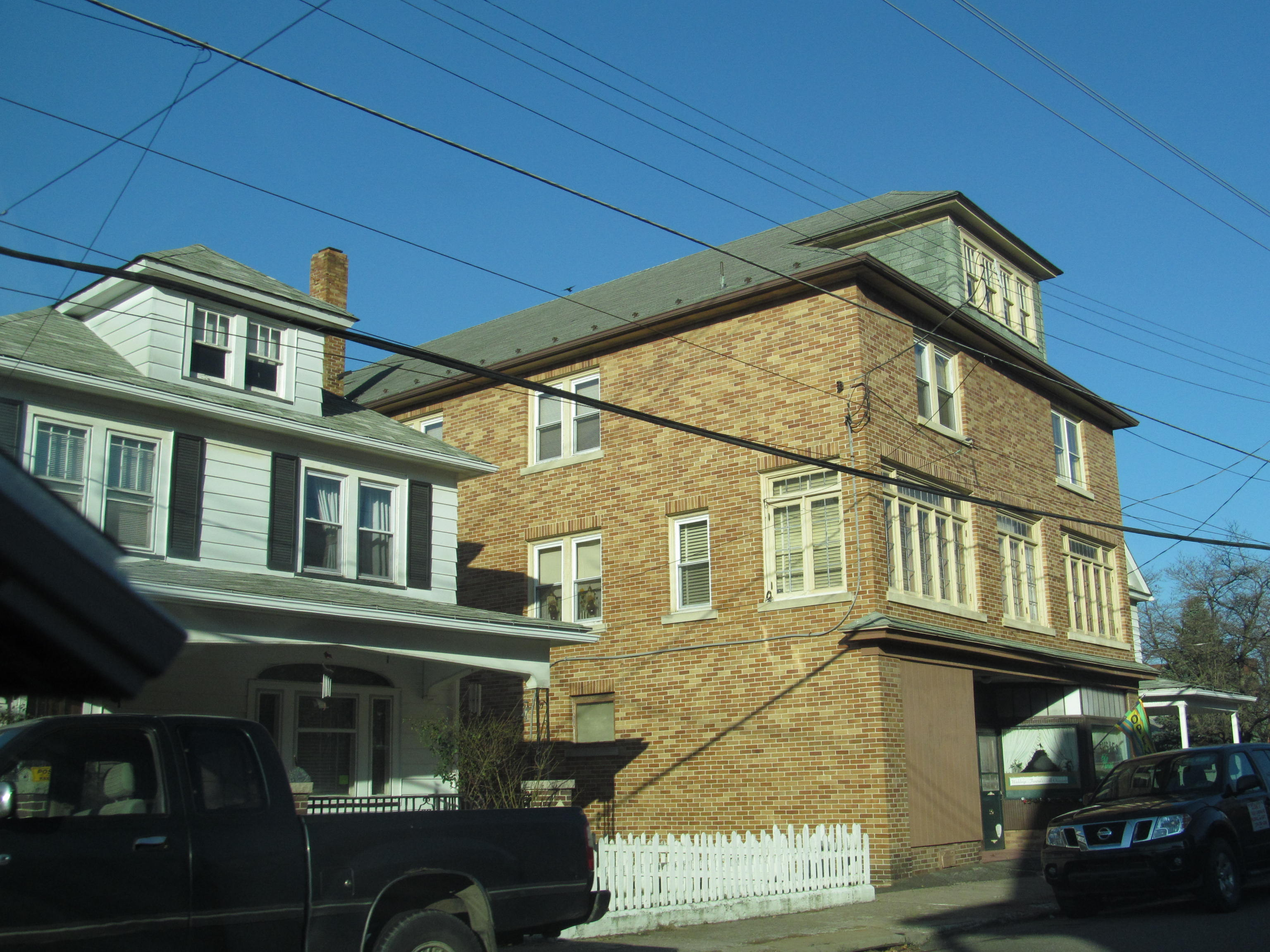 Glen Lyon, Pennsylvania